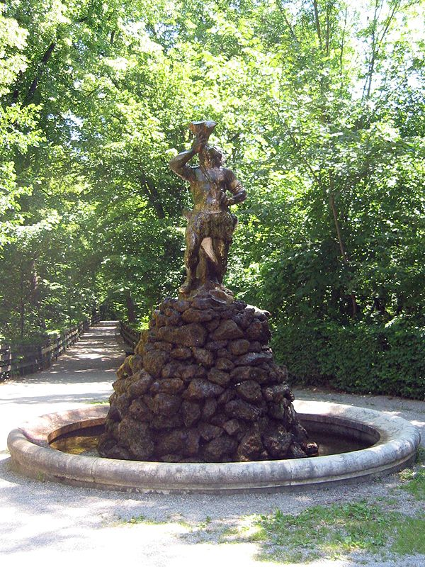 Freising, Mohrenbrunnen (1700)